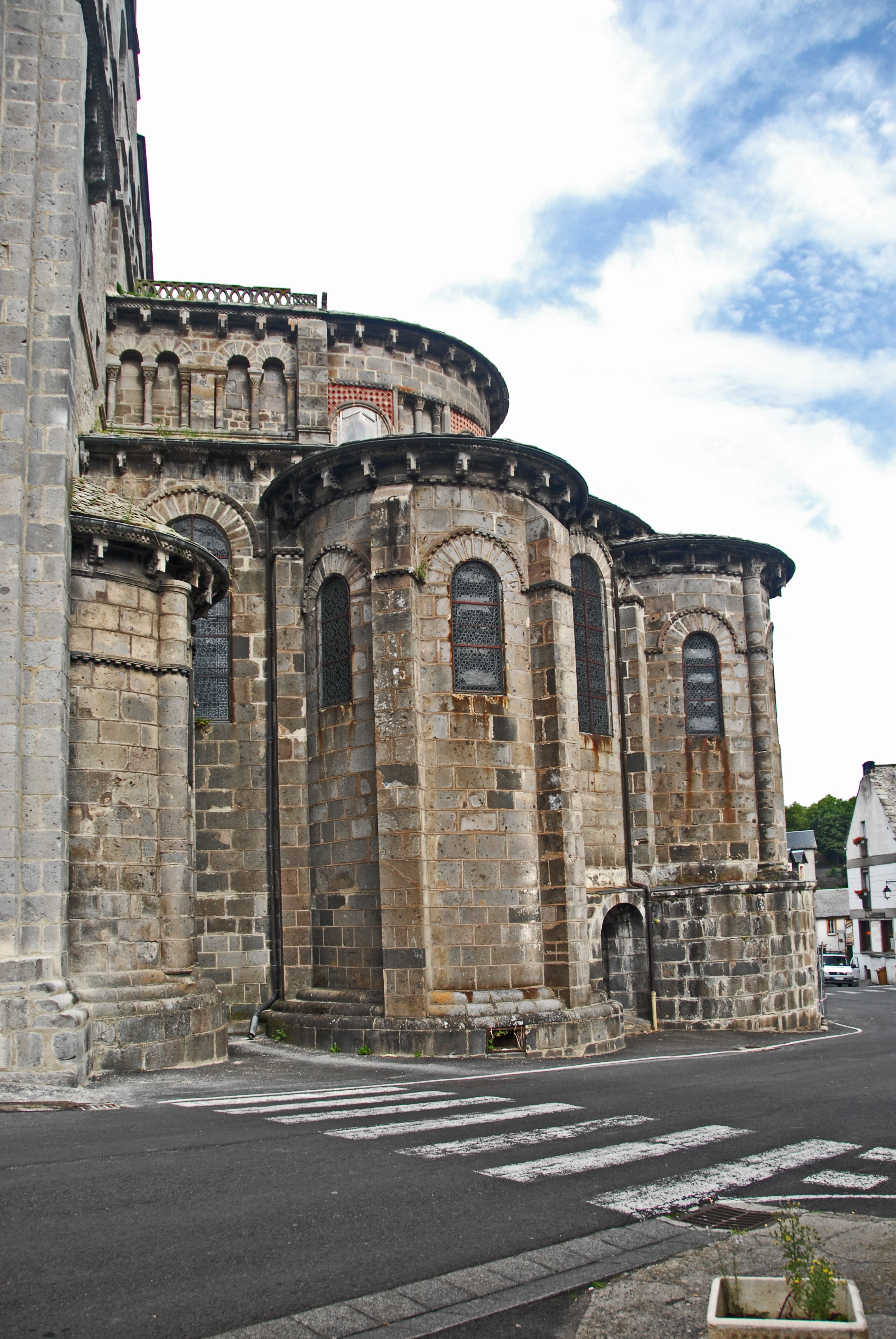 N.-D. d'Orcival, Chorhaupt von S